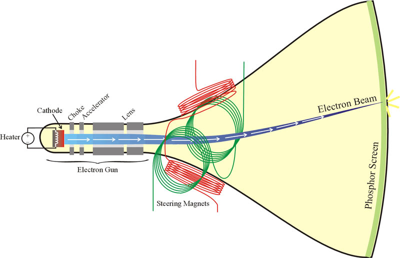 Ống phóng tia âm cực